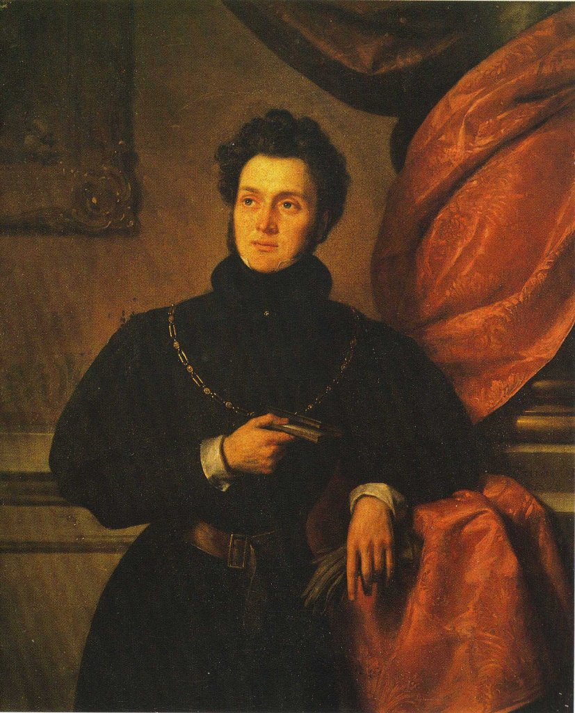 Portrait de M. Didier Petit de Meurville (première moitié du XIXe siècle)